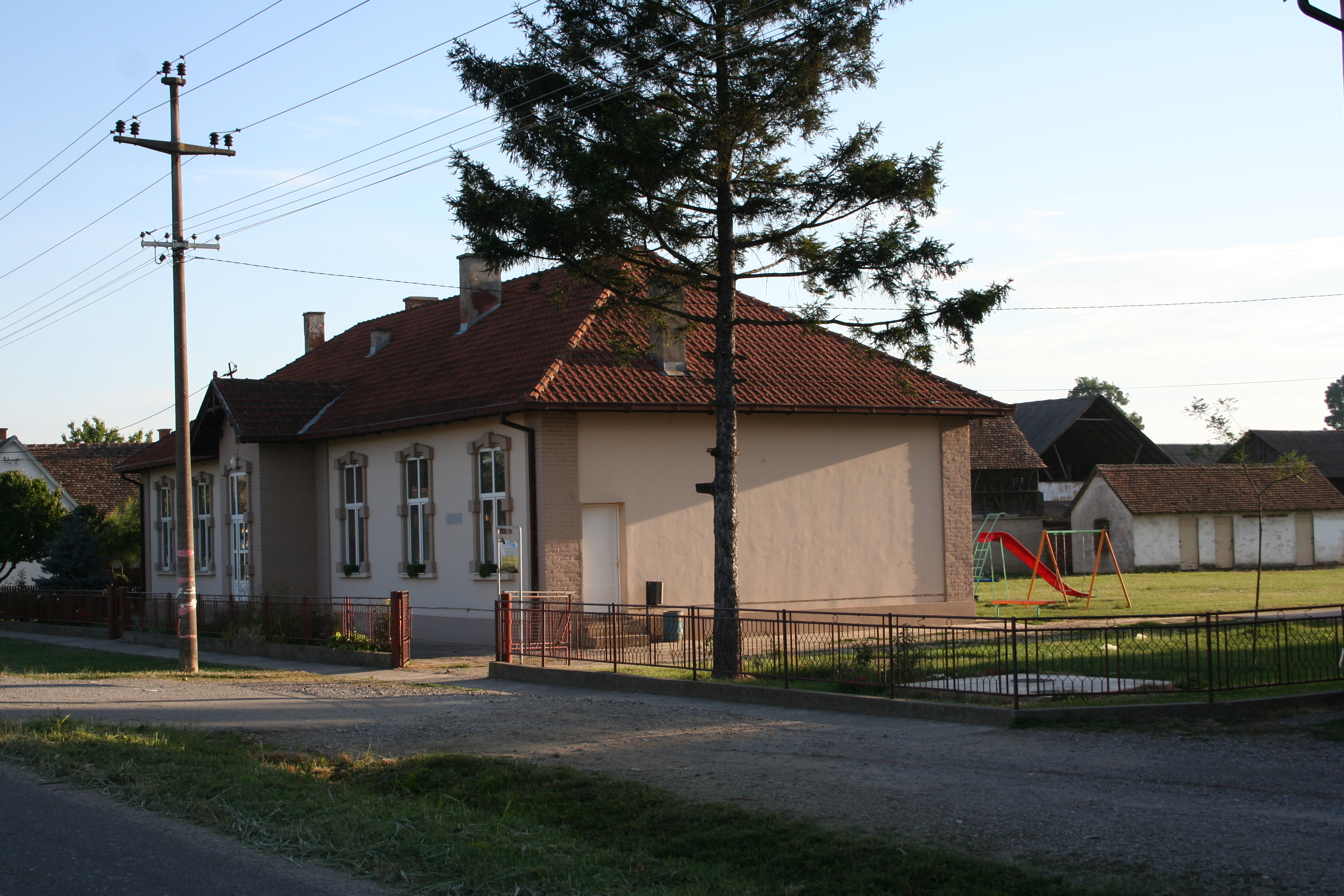 Zgrada seoske škole, Tabanović